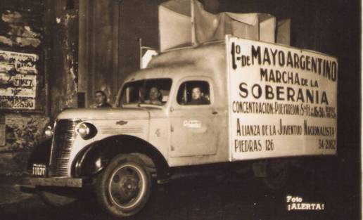 Agitación para la Marcha de la Soberanía del 1° de mayo de 1943, cuando la alianza de la Juventud Nacionalsista se convirtió en Alianza Libertadora Nacionalista